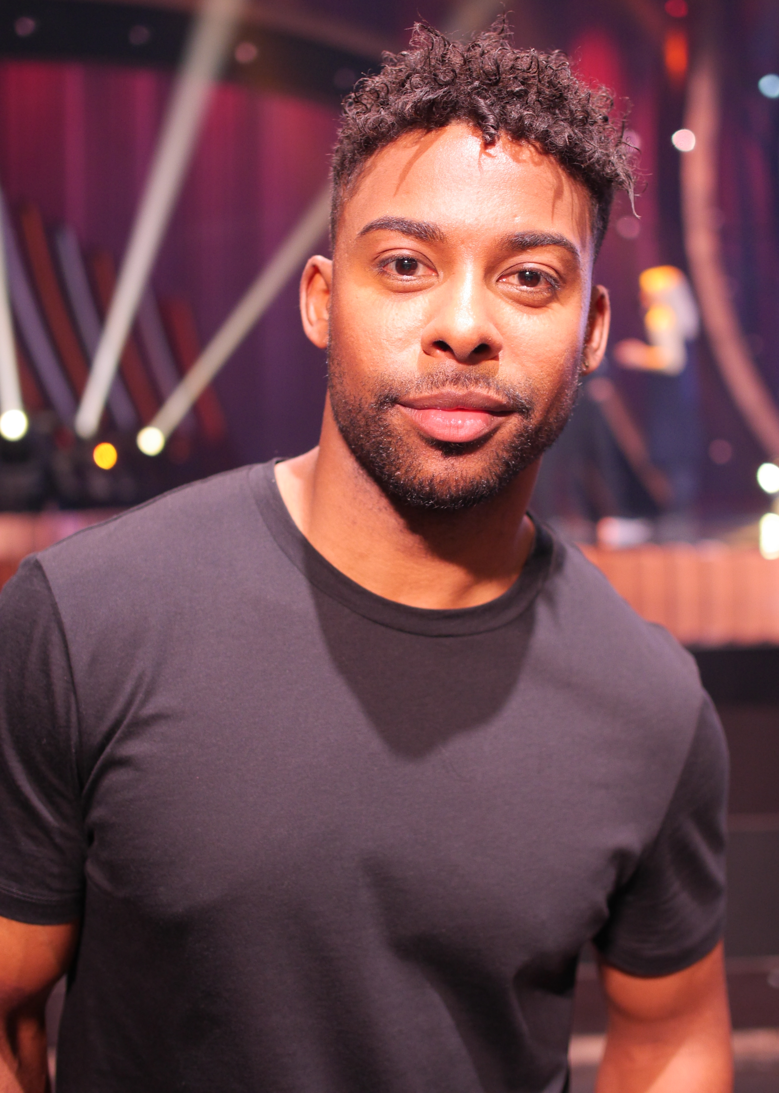 Pressbild 2020 John Lundvik